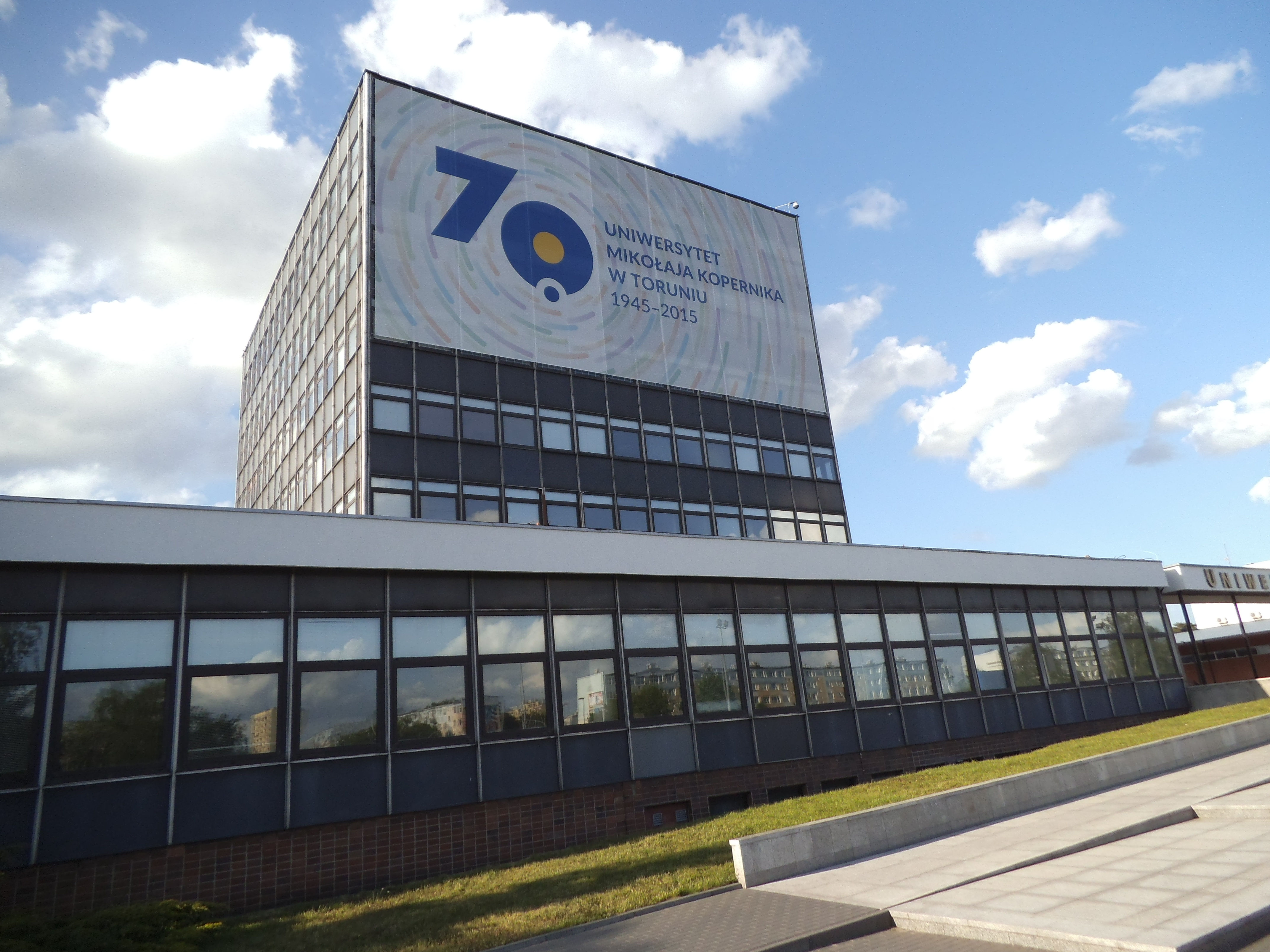 Rektorat UMK w Toruniu1